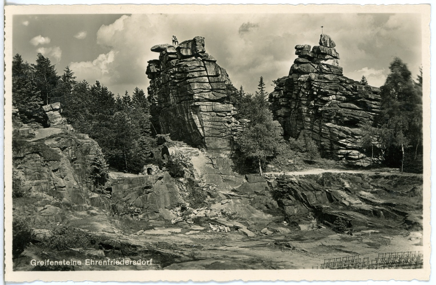 Ehrenfriedersdorf; Greifensteine This postcard is from publisher Brück & Sohn in Meißen ( postcard has a unique number 27005 and is available in a higher resolution at the publisher. This images was uploaded in a cooperation project between Wikipedians and the publisher.